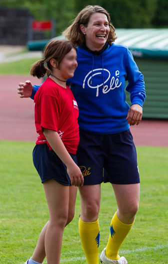 Sporttag schule.bewegt Magglingen 2012 - Kathrin Lehmann als Fussballtrainerin Foto: BASPO / Ulrich Känzi